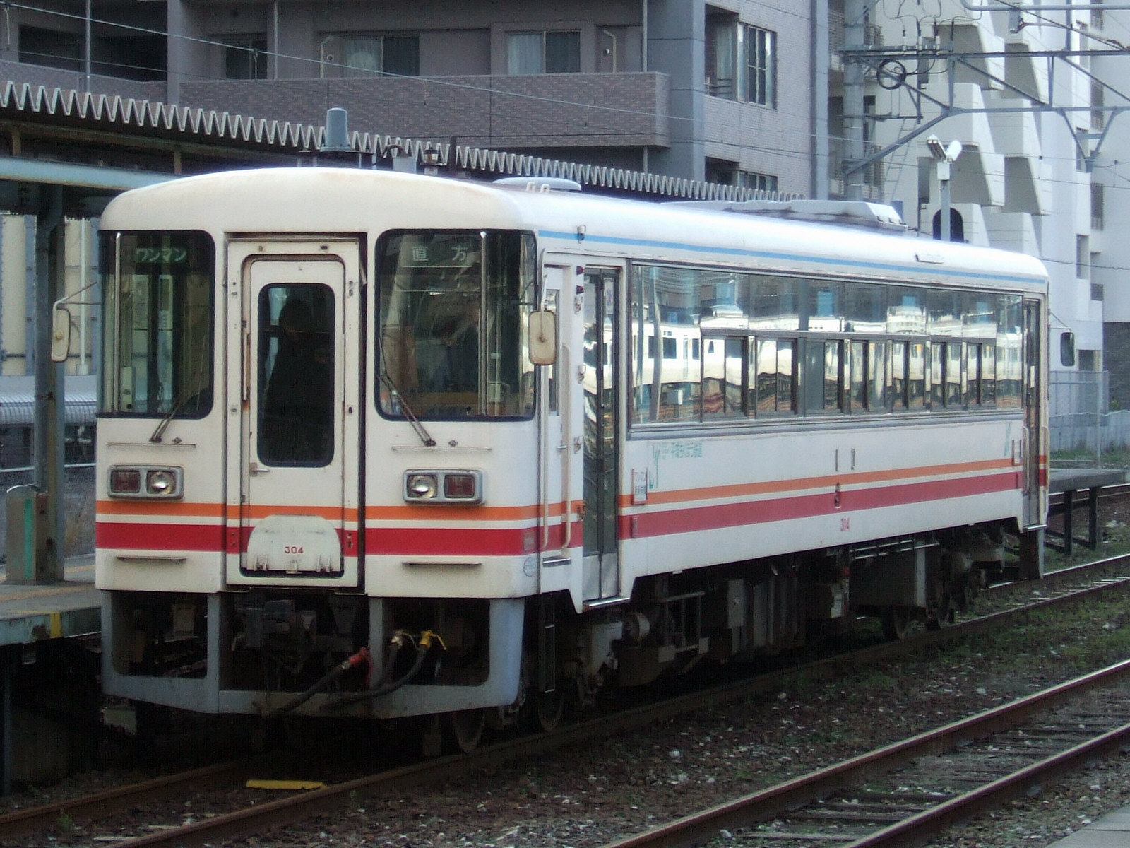 平成筑豊鉄道300形304号（直方駅にて）